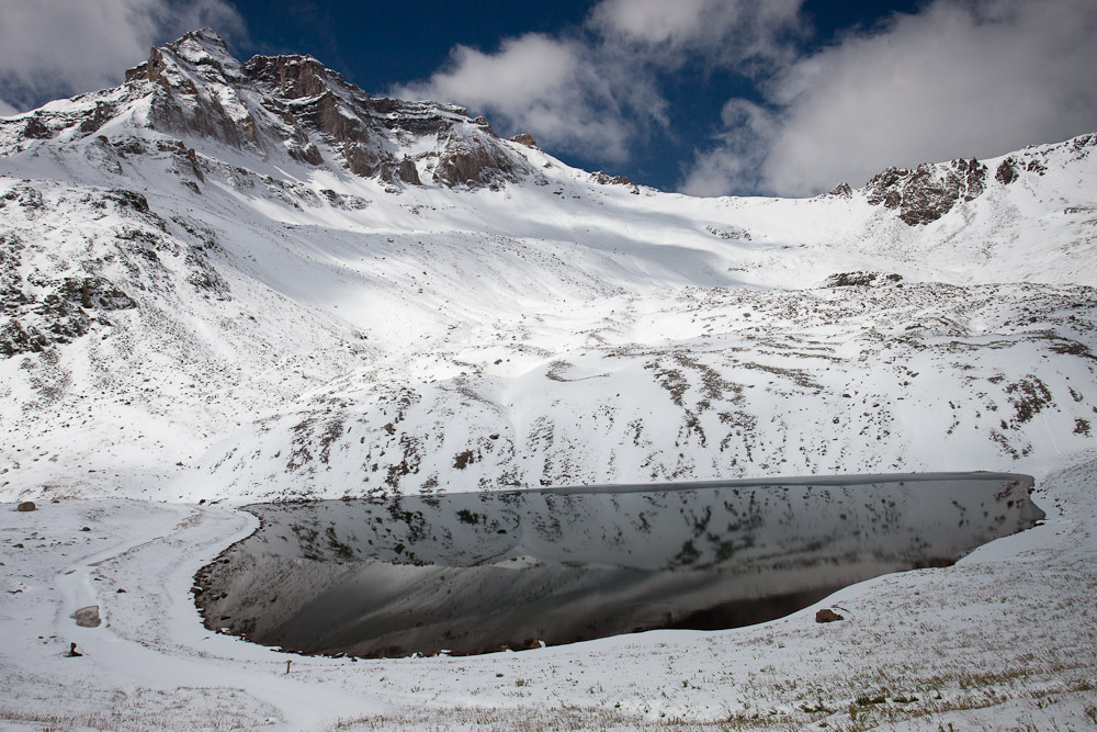 Yankee Boy Basin